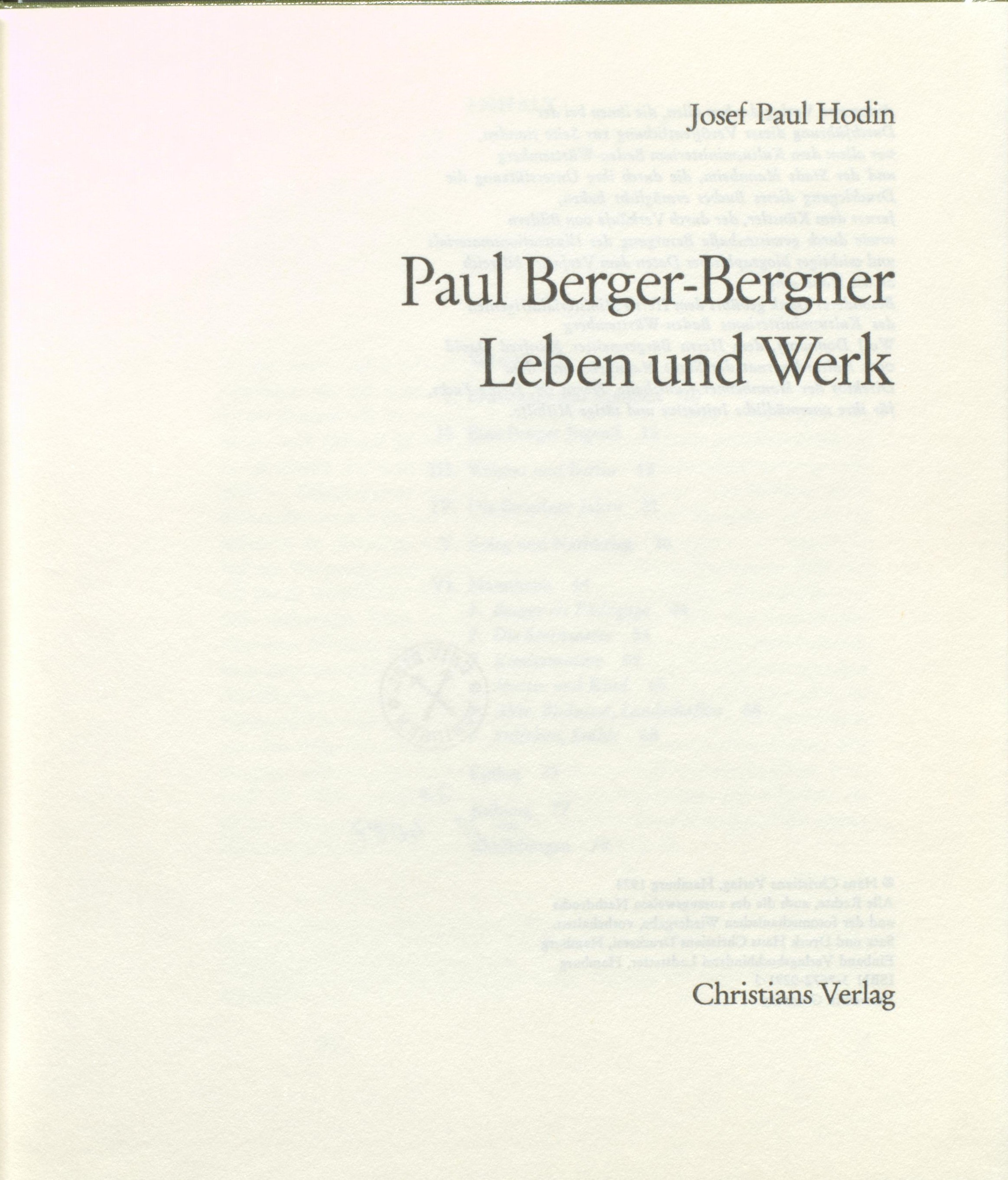 Josef Paul Hodin Paul Berger-Bergner Leben und Werk. Hamburg : Christians, 1974